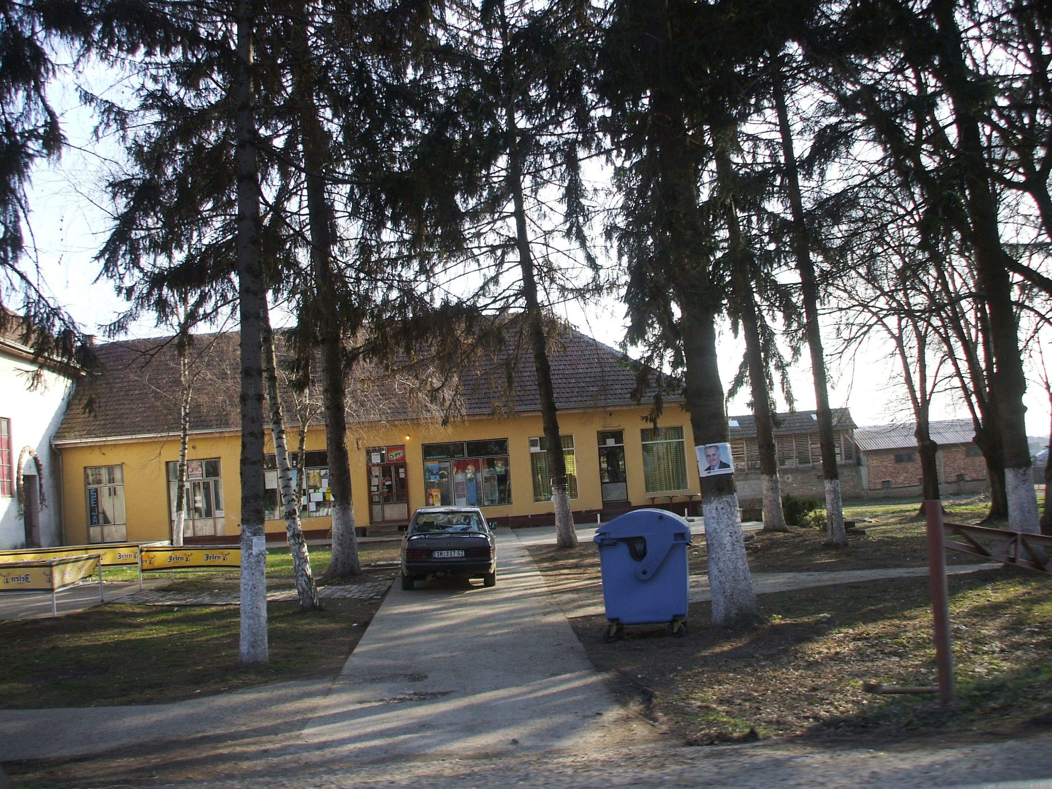 Средиште Бингулe